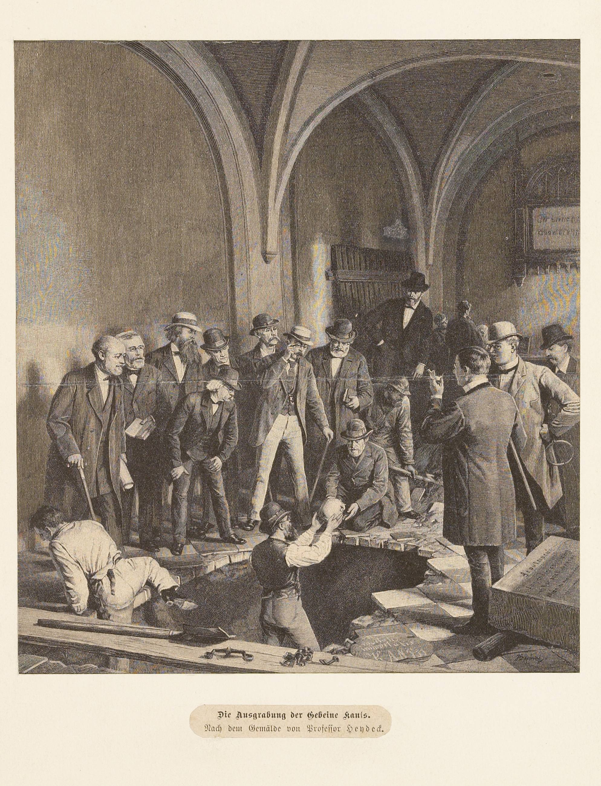 Exumierung von Kant 1880